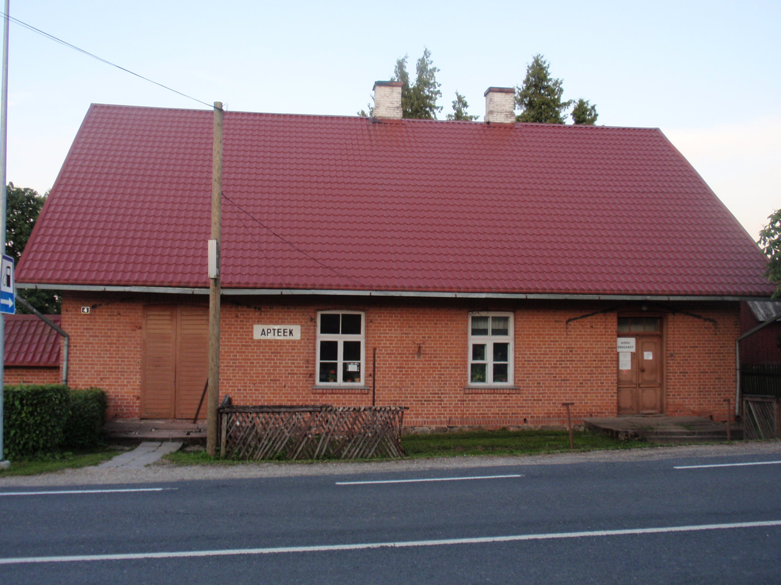 Kõpu Apteek